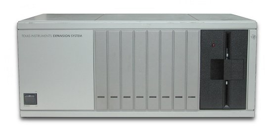 Foto eines Texas Instruments TI Peripheral Expansion System (Vorderansicht)